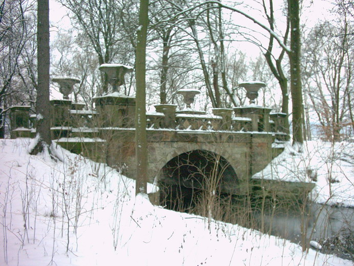 Sandsteinbrücke im Schlosspark SZ-Ringelheim